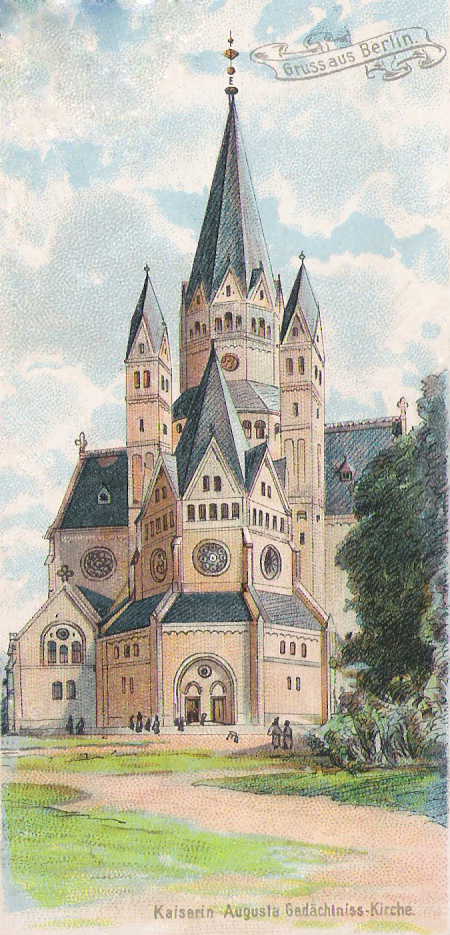 Ansichtskarte Kaiserin Augusta Gedächtnis-Kirche / Berlin